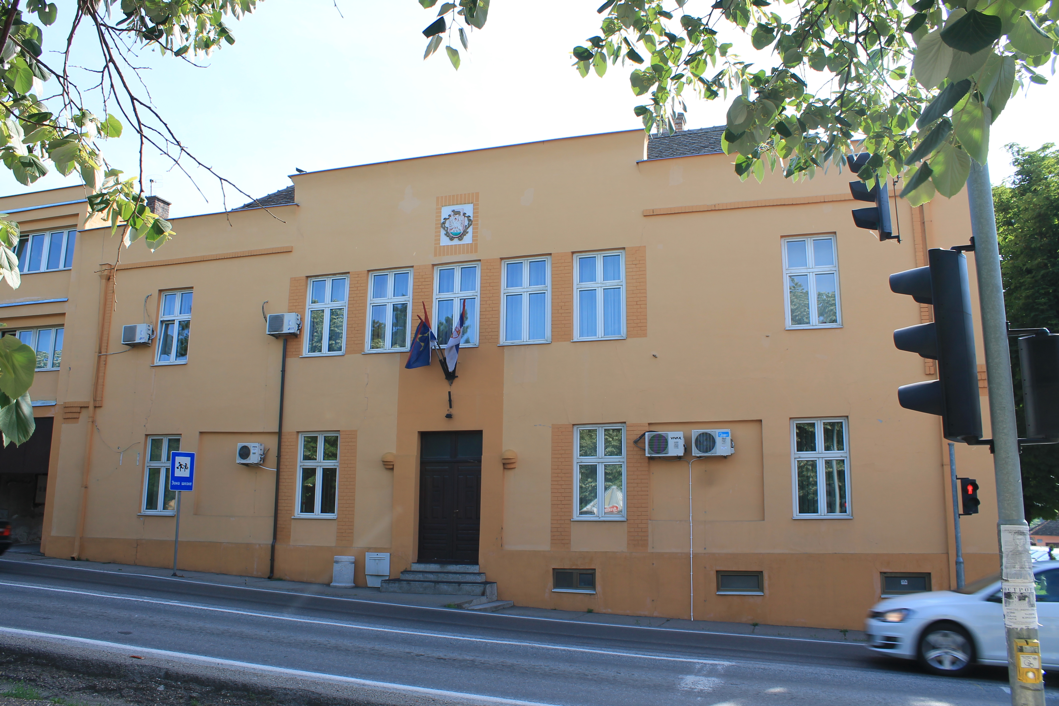 Irig i u Irigu